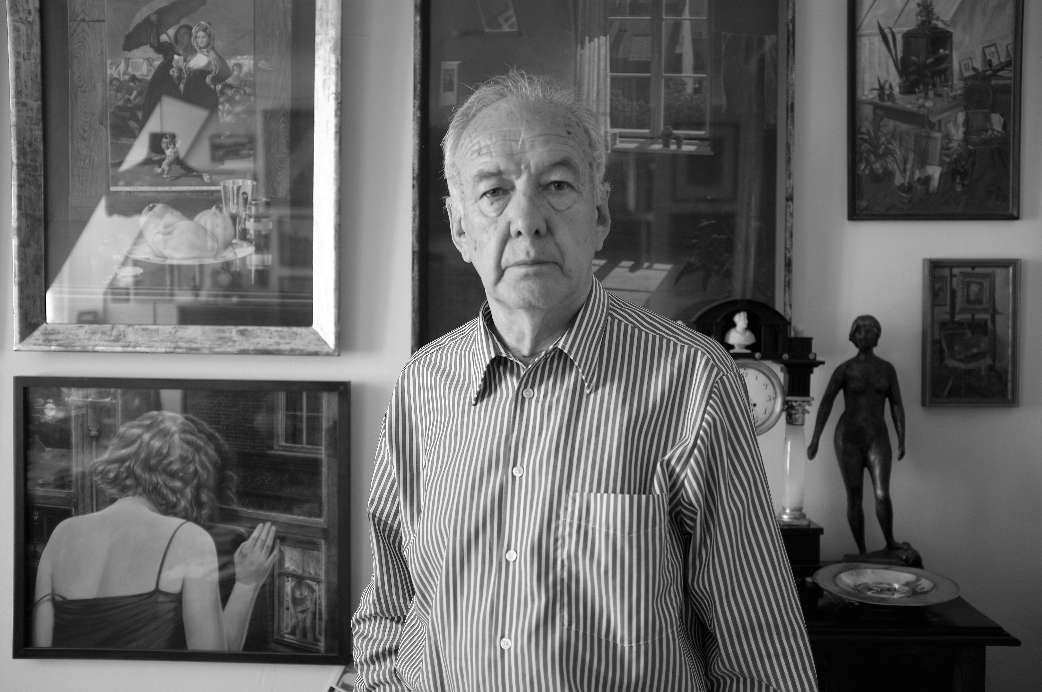 Selbstportait Foto des Künstlers Max Pfaller